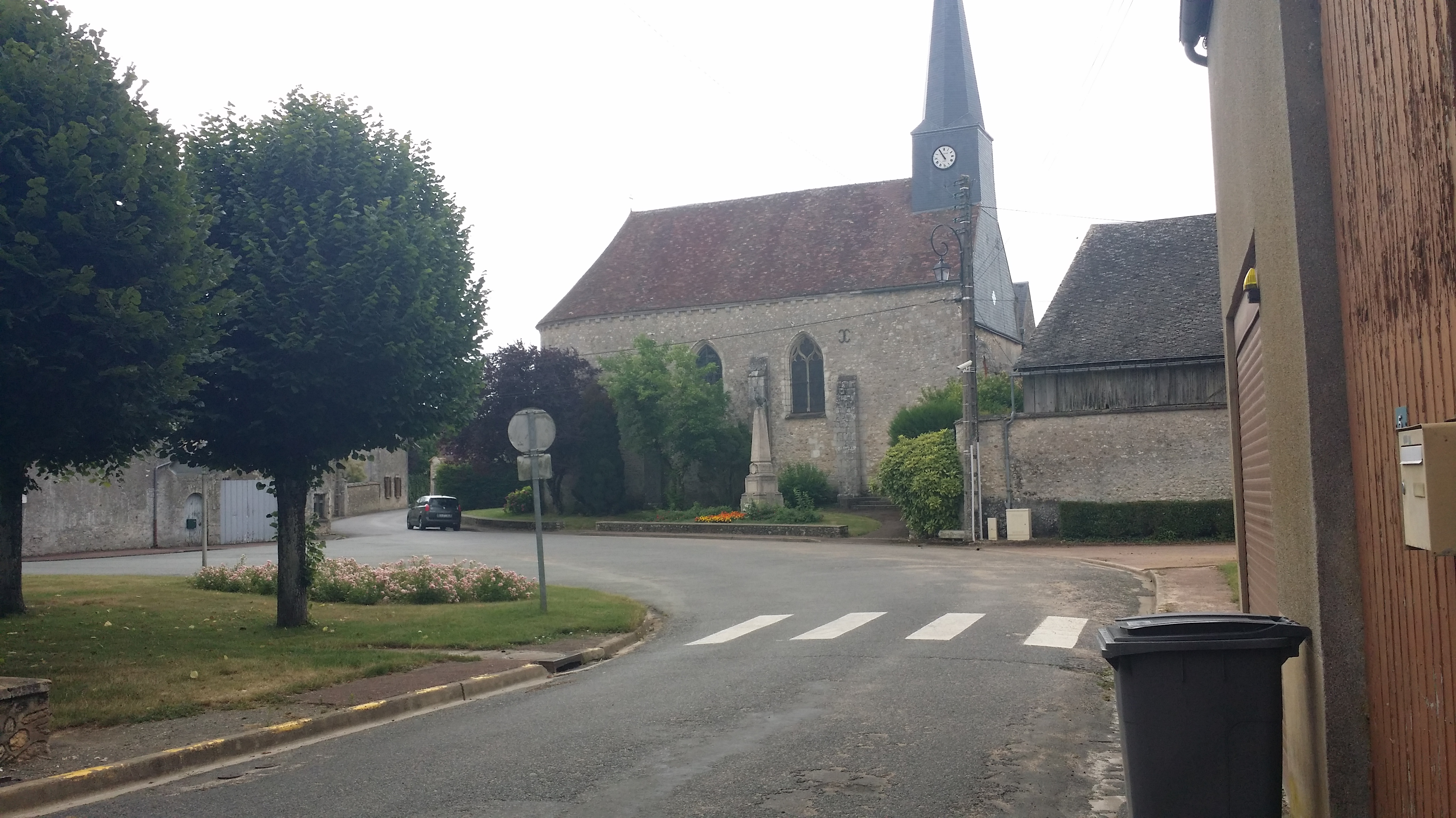 Eglise